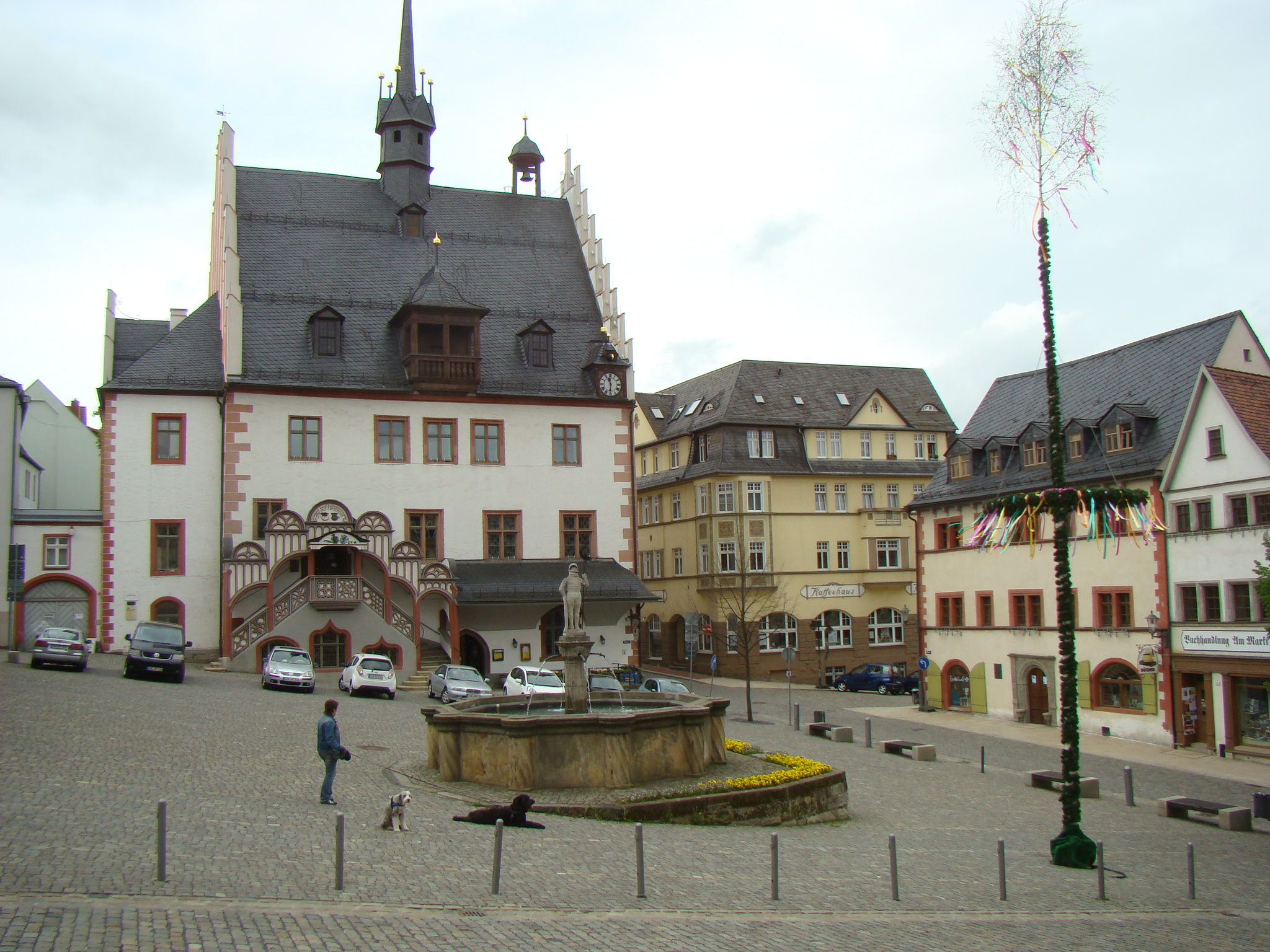 Pößneck